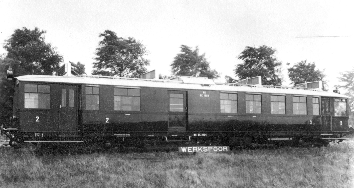 Foto van de BC 1904 voor de Nederlandse Spoorwegen op het terrein van Werkspoor in Utrecht. Foto gemaakt door Werkspoor. Het object, uitgegeven door een instantie, is vanaf 70 jaar na publicatie niet meer auteursrechtelijk beschermd.